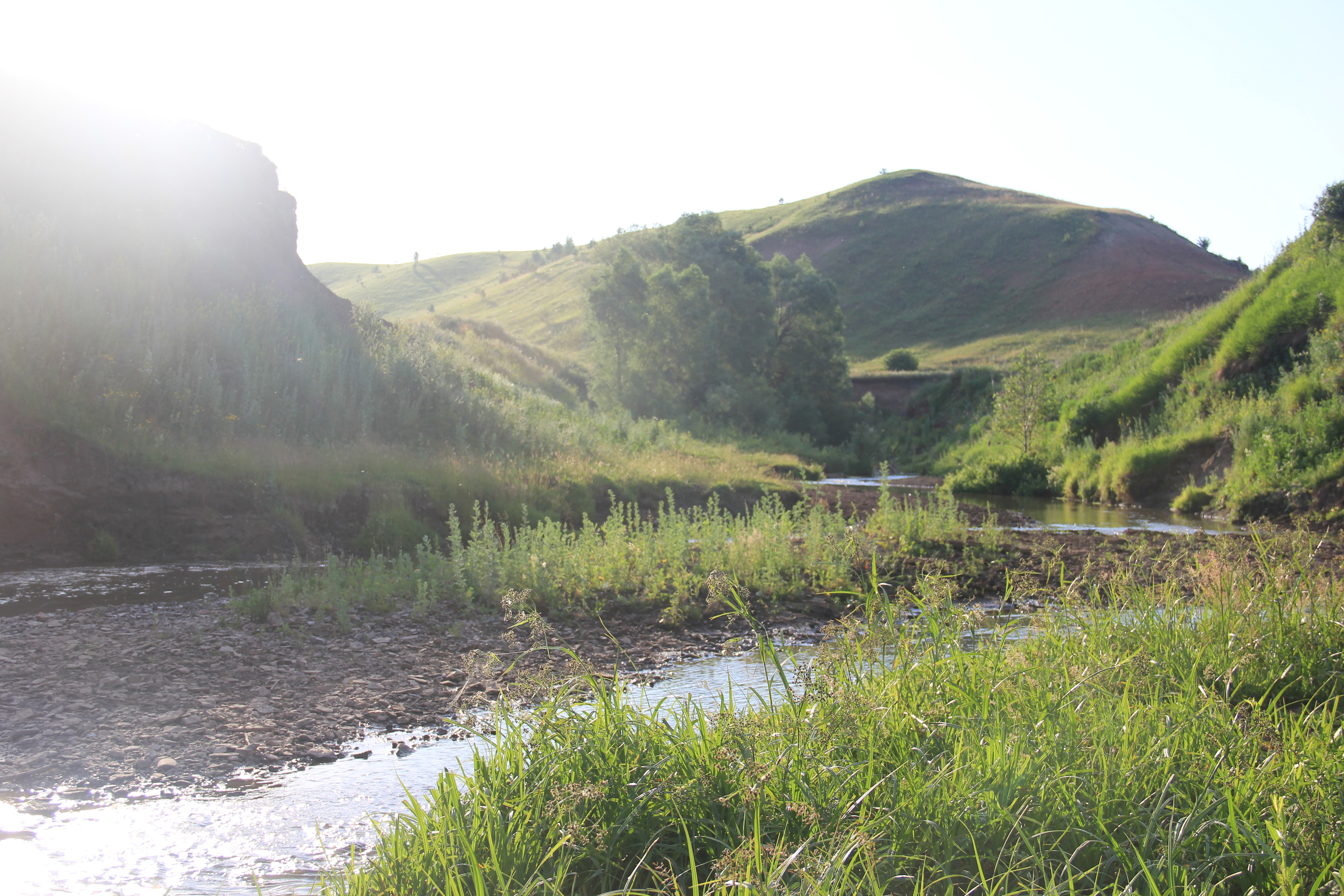 Река Шерашлинка